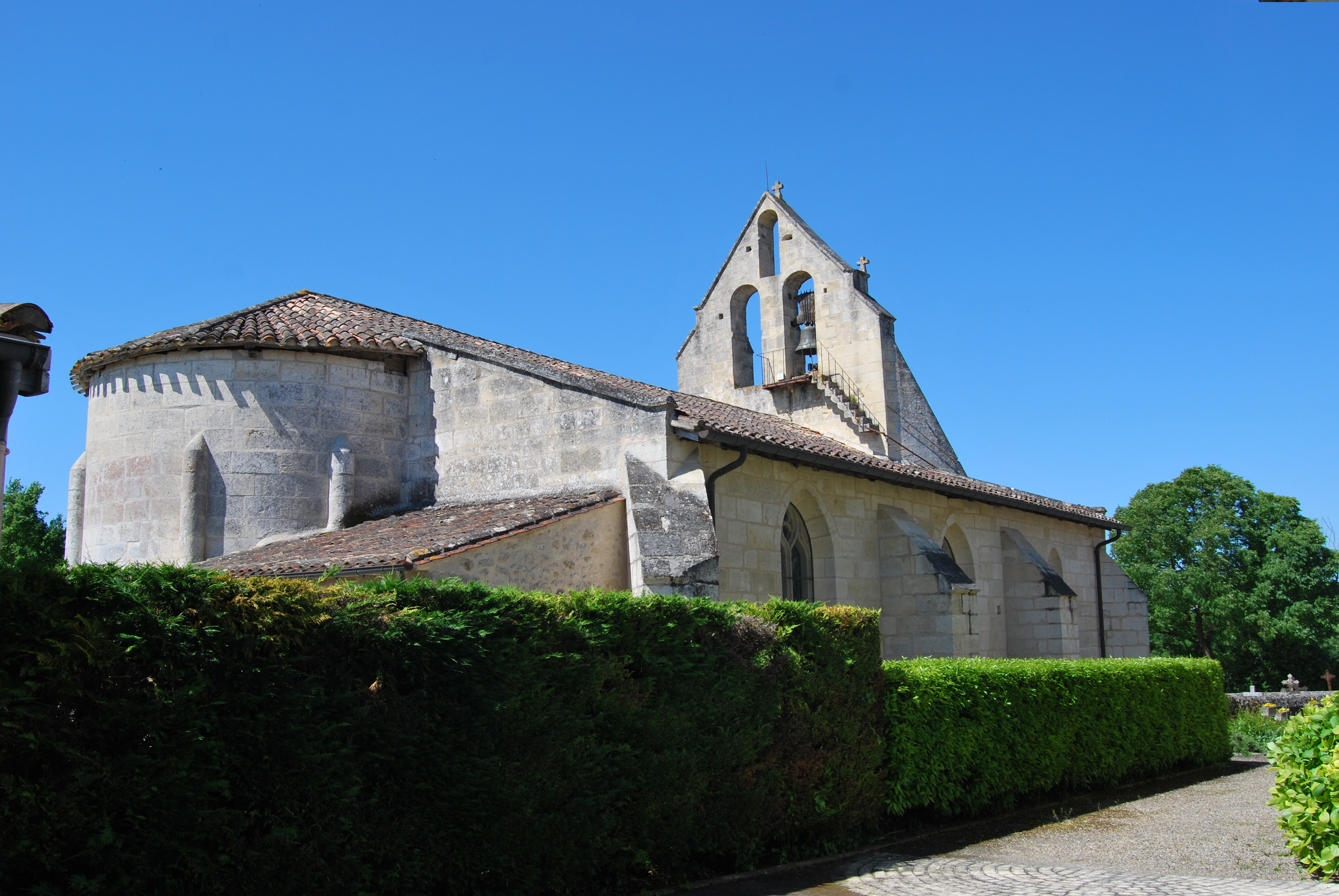 Blésignac église